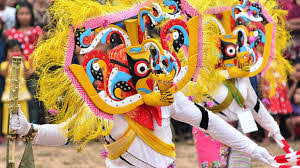 ritual kematian yang di tarikan oleh beberapa orang diiringi alat musik khas dayak tomun